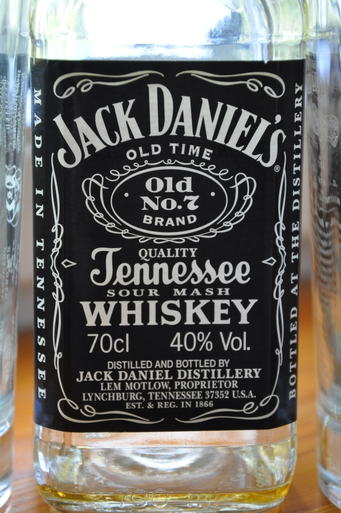 Jack Daniel's Whiskey.